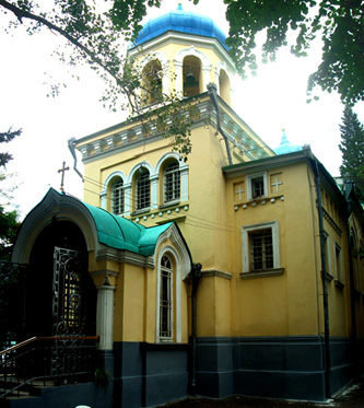 Церковь Св. Александра Невского, Тбилиси, Грузия